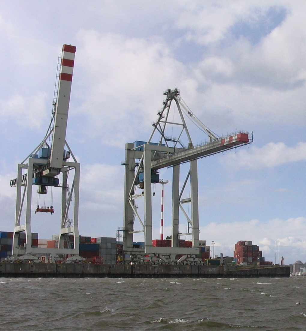 Containerbrücken im Hamburger Hafen; Gantry Crane at Port of Hamburg